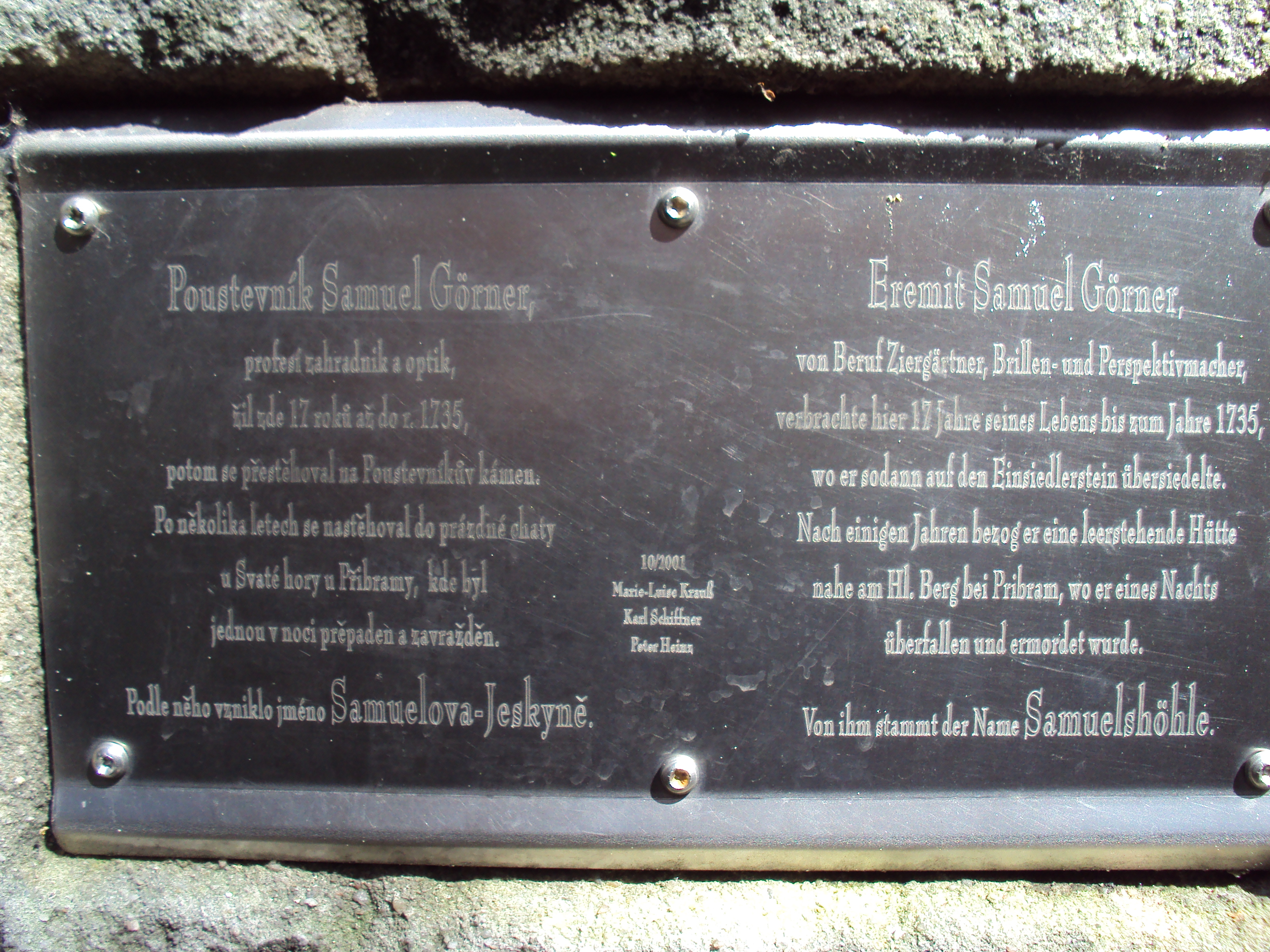 Infodestička v Samuelově jeskyni nad Sloupem v Čechách Text: "Poustevník Samuel Görner, profesí zahradník a optik, žil zde 17 roků až do r. 1735, potom se přestěhoval na Poustevníkův kámen. Po několika letech se nastěhoval do prázdné chaty u Svaté hory u Příbramy, kde byl jednou v noci prěpaden a zavražděn. Podle něho vzniklo jméno Samuelova-Jeskyně.– Eremit Samuel Görner, von Beruf Ziergärtner, Brillen- und Perspektivmacher, verbrachte hier 17 Jahre seines Lebens bis zum Jahre 1735, wo er sodann auf den Einsiedlerstein übersiedelte. Nach einigen Jahren bezog er eine leerstehende Hütte nahe am Hl. Berg bei Pribram, wo er eines Nachts überfallen und ermordet wurde. Von ihm stammt der Name Samuelshöhle.– 10/2001, Marie-Luise Krauß, Karl Schiffner, Peter Heinz."